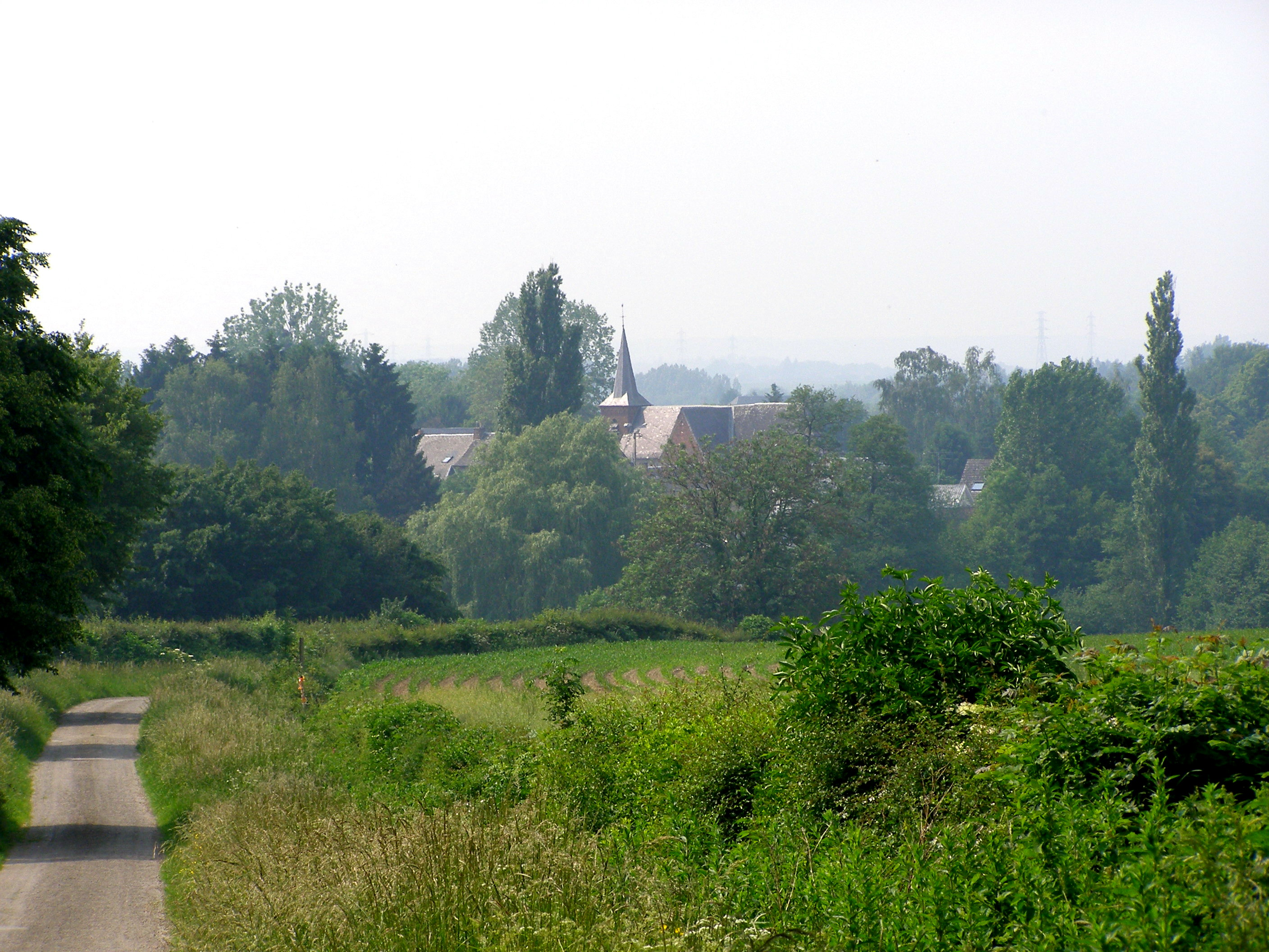 Vue d'ensemble.